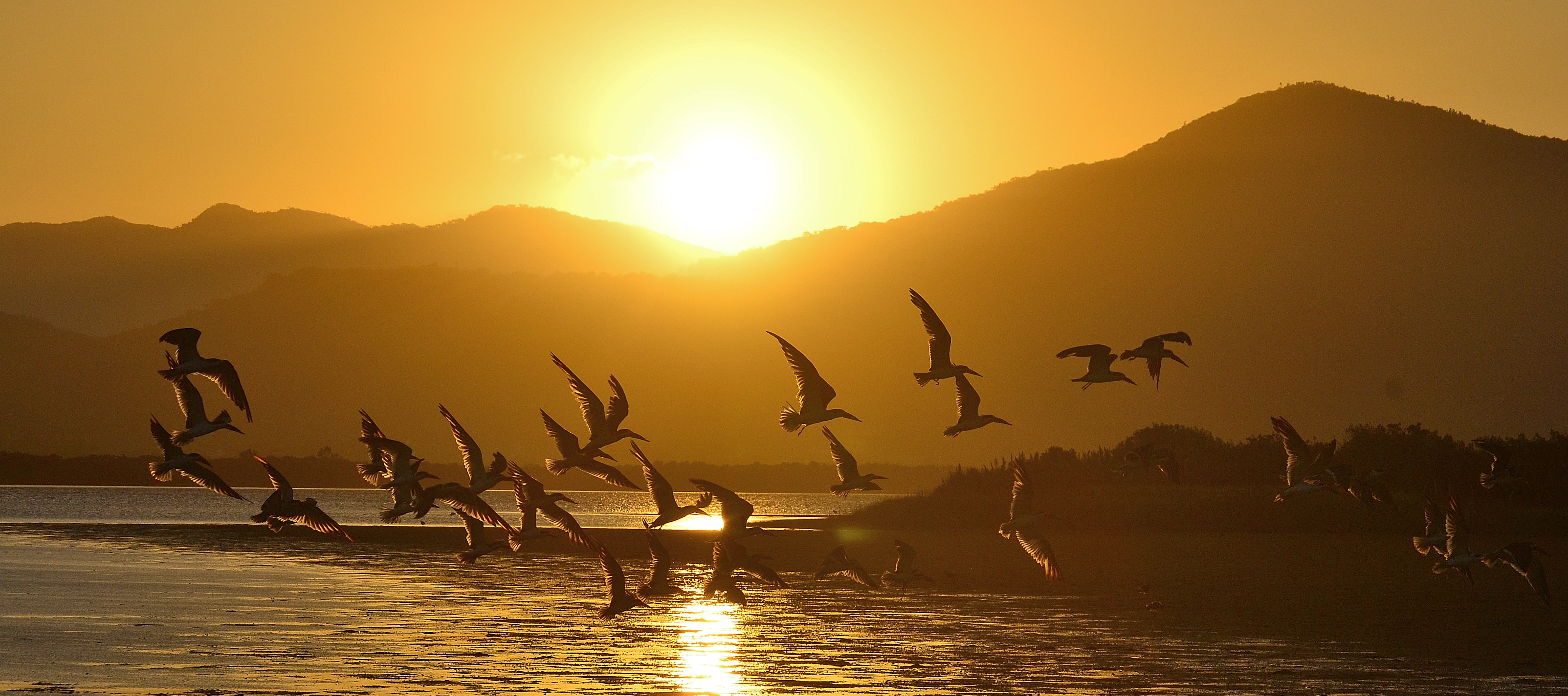 Por-do-Sol entre asas de aves sobre a Lagoa de Garopaba.